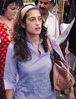 Fatima Bhutto